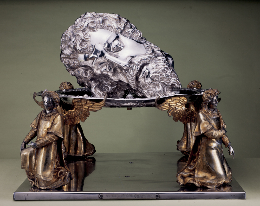 Reliekhouder van Sint-Jan Baptist, 1624 - 1625; inv: 563